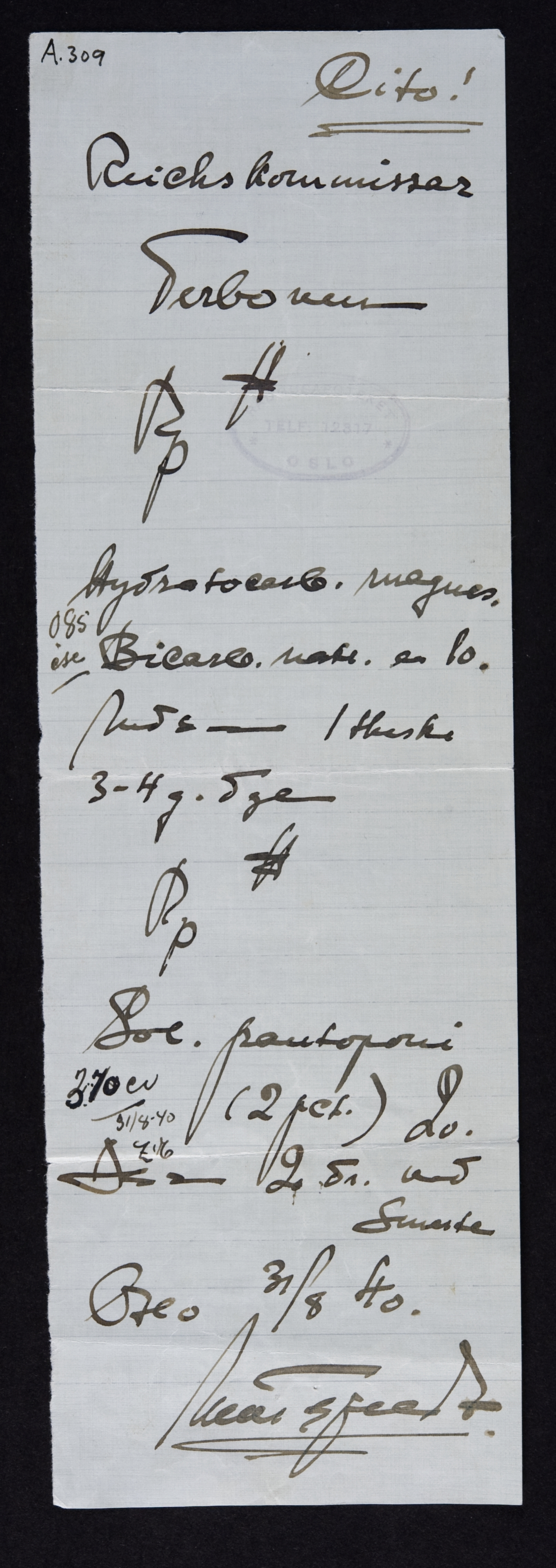 Svakt blågrønn resept med mørkeblå blekkhåndskrift, utskrevet i 1940, antakelig ved Rådhusapoteket, Tordenskiolds gate 12, Oslo.